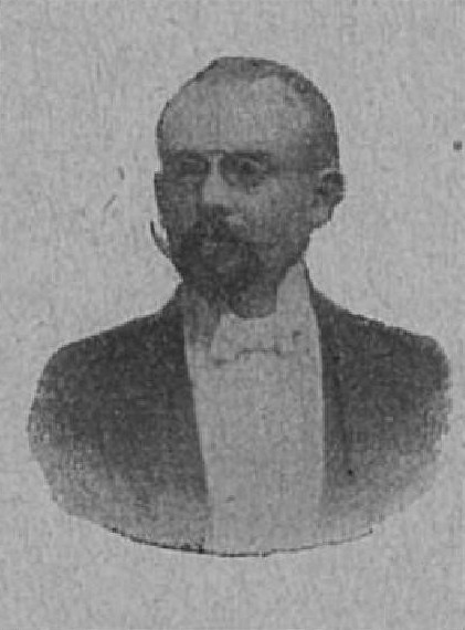 Ladislav Dvořák (1866-?), rakouský a český právník, pedagog a politik